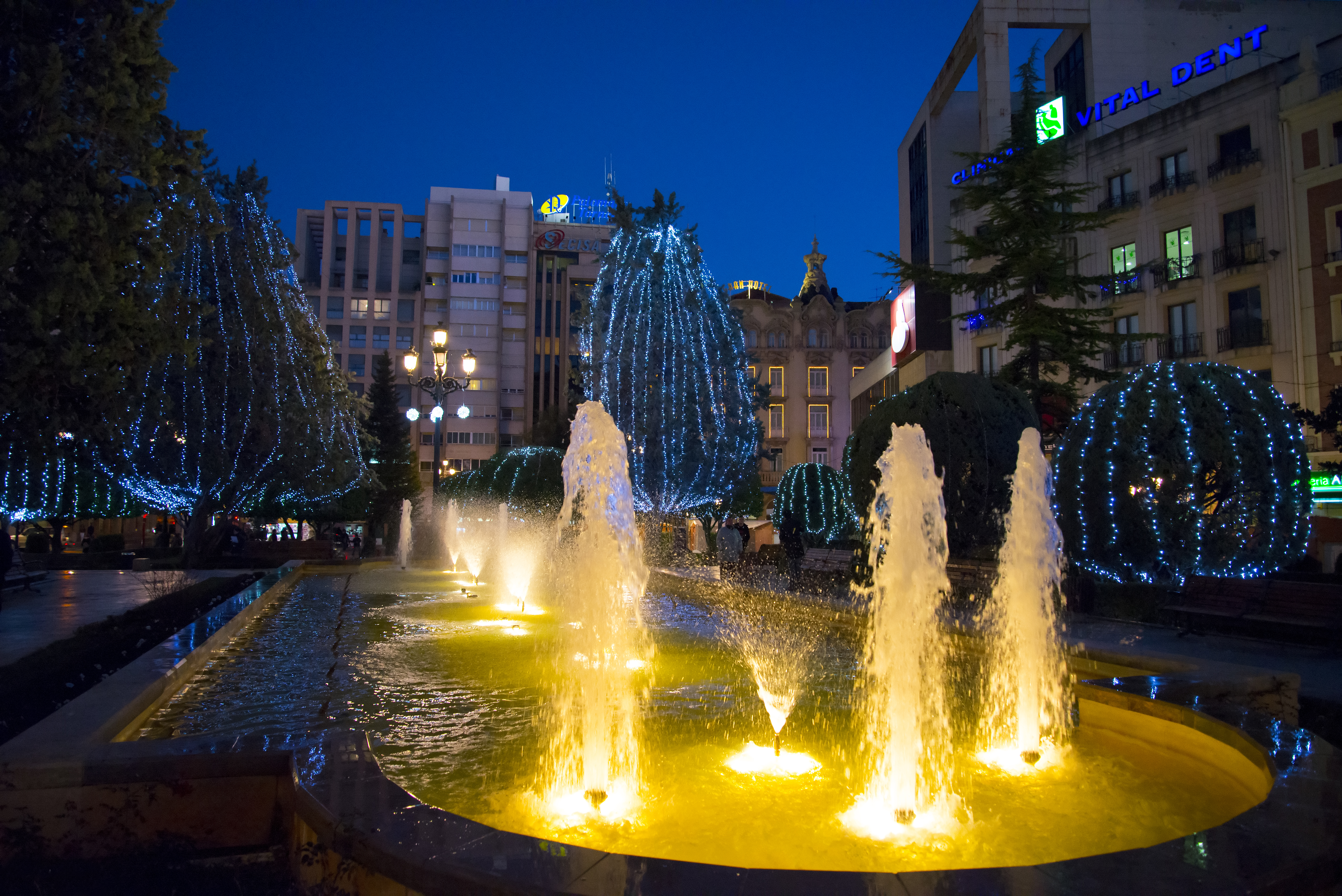 Albacete nocturno